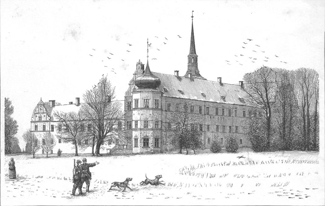 Brahetrolleborg, Hovedsædet i Baroniet Brahetrolleborg, hed oprindelig Holmekloster og var anlagt 1170 af Cisterciensere. Af den gamle Klosterbygning er kun den vestlige Fløj tilbage, den østlige opførtes af Kai Rantzau 1620. Hele Hovedbygningen blev restaureret og udvidet ca. 1870. Efter Reformationen var klosteret inddraget under Kronen, indtil Frederik II 1568 solgte Gaarden til Henrik Rantzau, der kaldte den Rantzauholm. Af senere Ejere kan nævnes den bekendte Kai Lykke og Fru Birgitte Trolle, Enke efter Mandrup Brahe, som 1672 fik oprettet Baroniet Brahetrolleborg. Siden 1722 tilhærer Godset Slægten Reventlow.